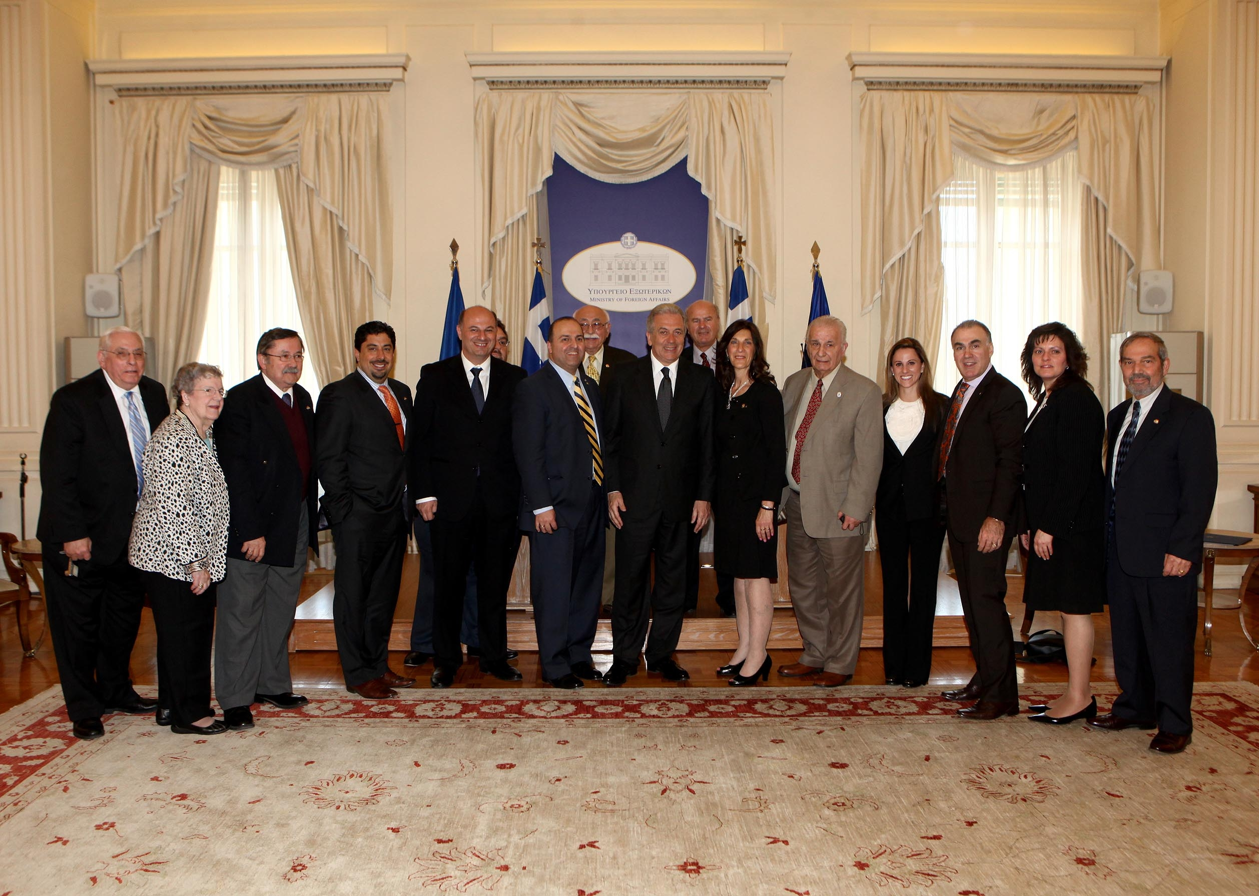 Την Τρίτη 9 Απριλίου 2013 ο Υπουργός Εξωτερικών Δημήτρης Αβραμόπουλος συναντήθηκε στο Υπουργείο Εξωτερικών με Αντιπροσωπεία της Ελληνοαμερικανικής Οργάνωσης AHEPA (American Hellenic Educational Progressive Association)